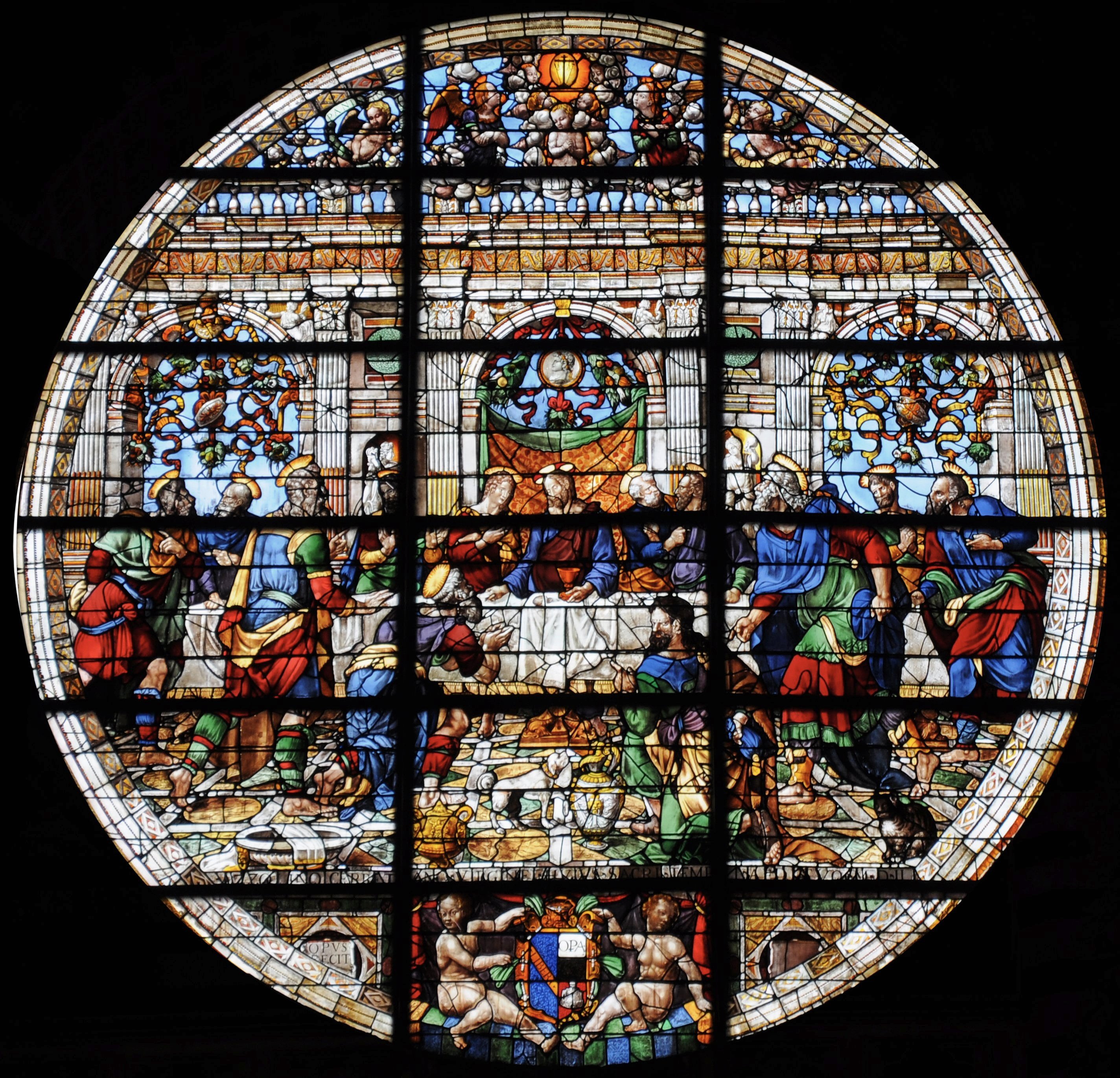 Rosone del Duomo di Siena